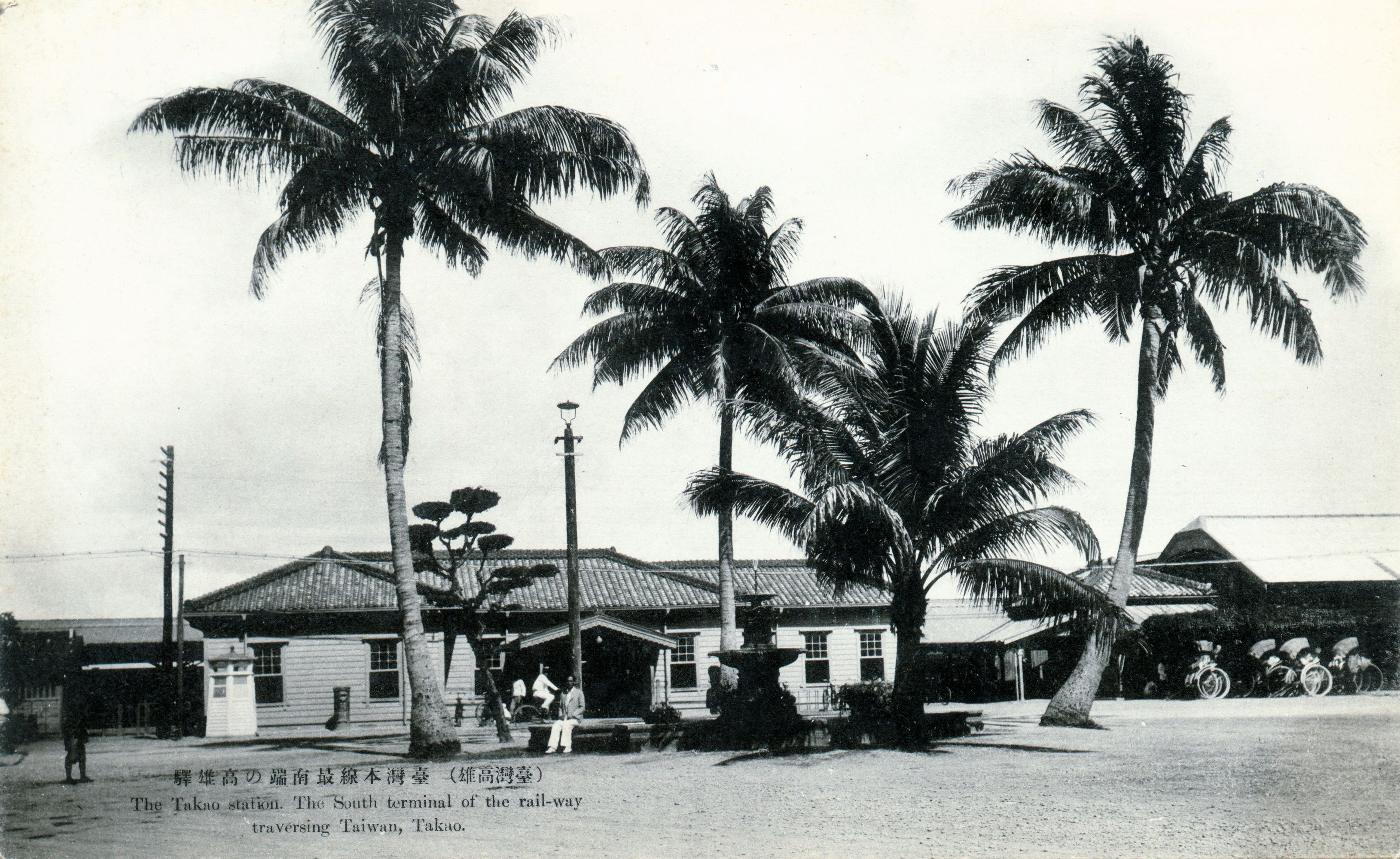 中文（台灣）: 臺灣本線最南端的高雄車站